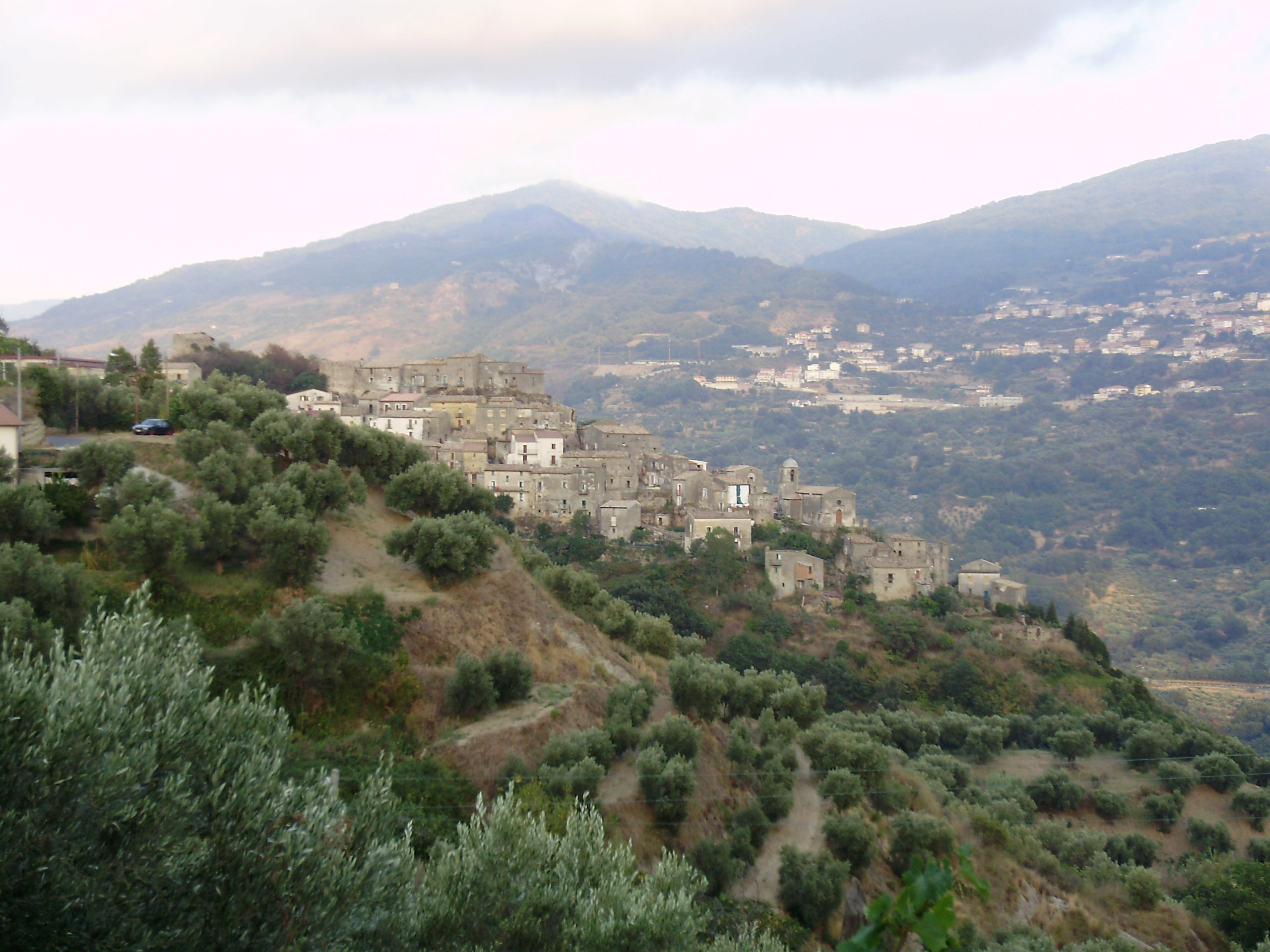 Savuto, frazione di Cleto.